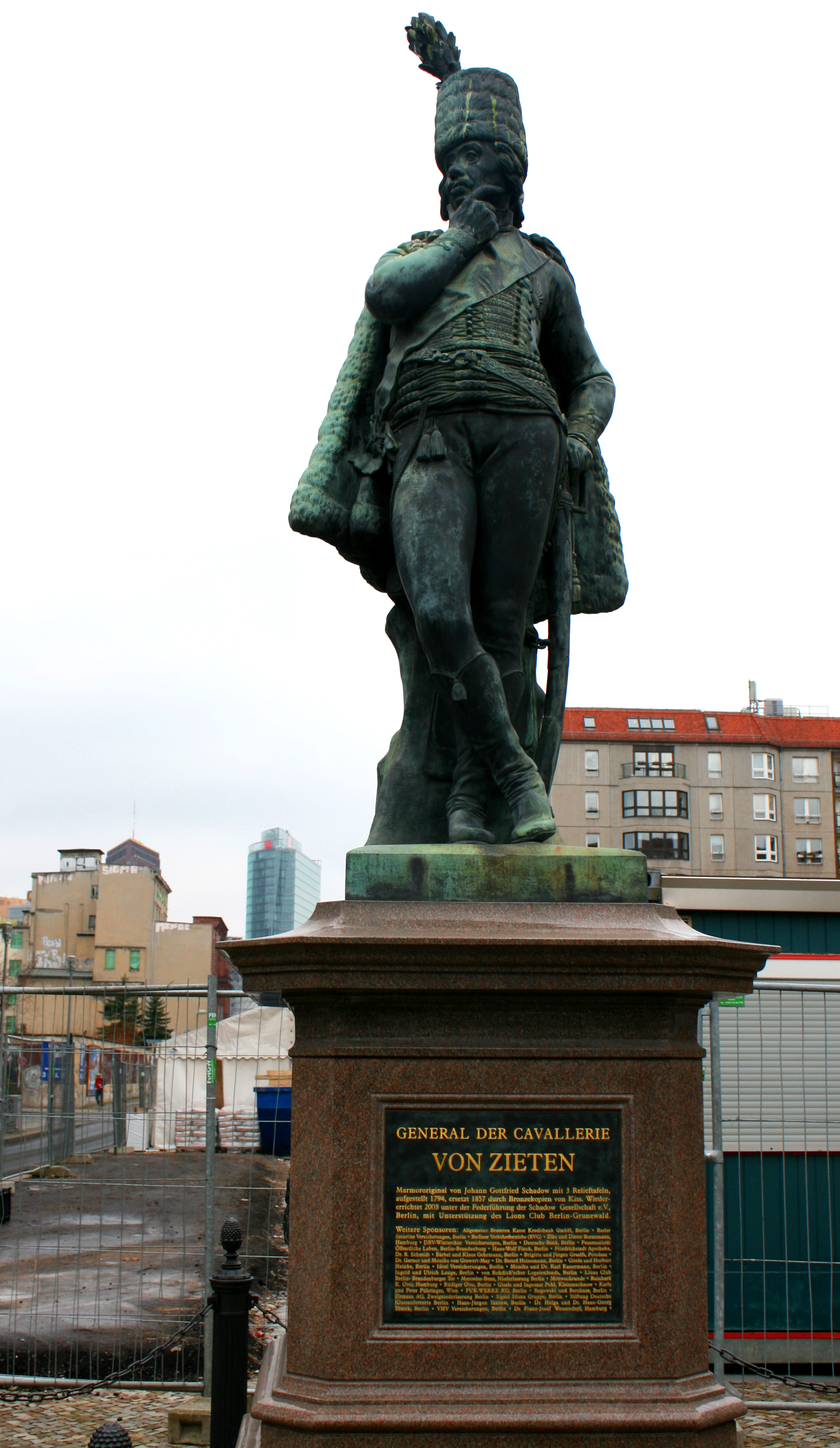 Denkmal für Hans Joachim von Zieten am Zietenplatz in Berlin